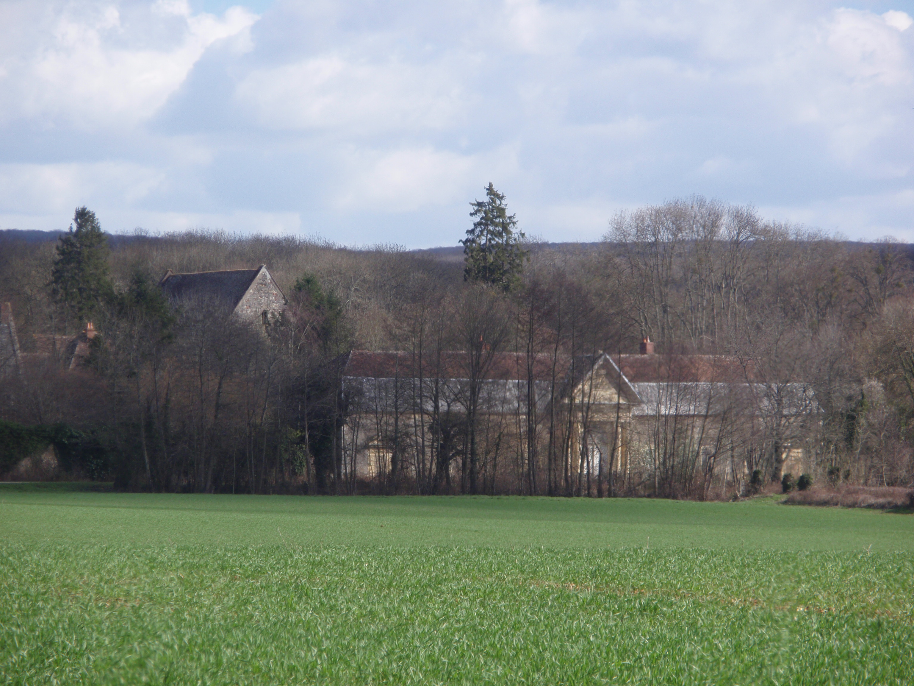 Vue de la chartreuse de Bellary, Châteauneuf-Val-de-Bargis (Nièvre)